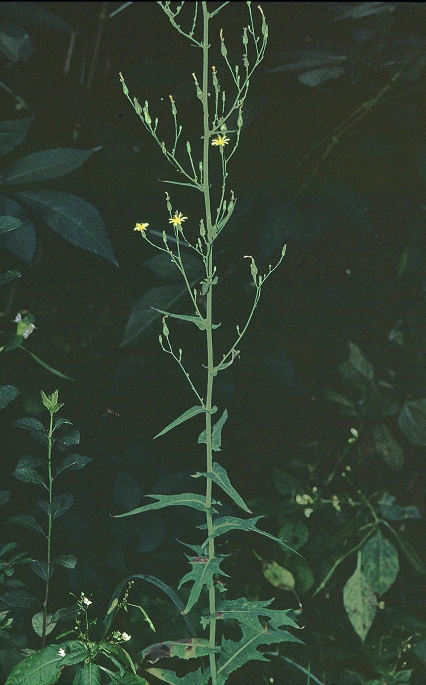 Lactuca quercina in Unterfranken, Germany